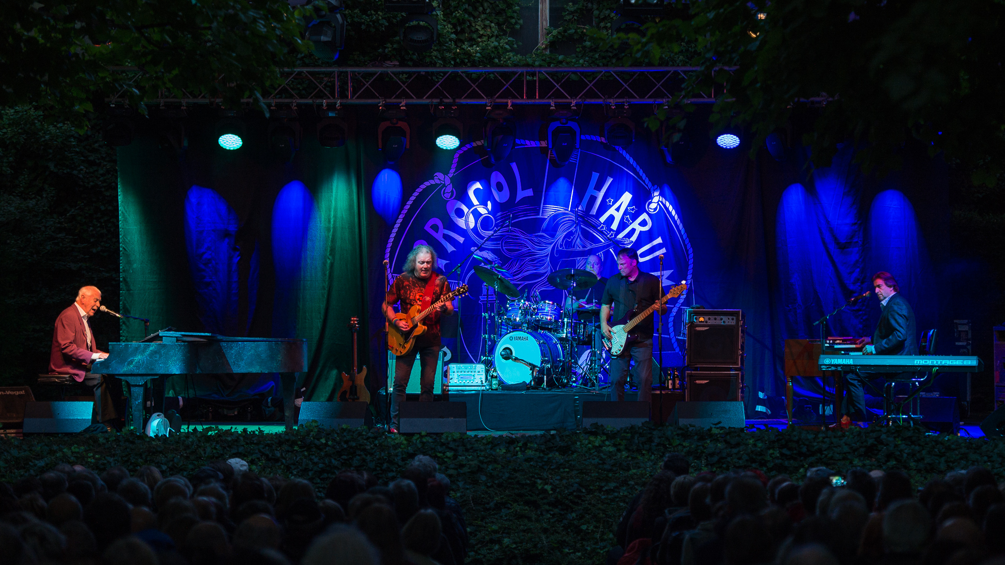 Concertbüro Franken,Gary Brooker,Geoff Dunn,Geoff Whitehorn,Josh Phillips,Konzert,Livekonzert,Livemusik,Matt Pegg,Musik,Procol Harum,Serenadenhof